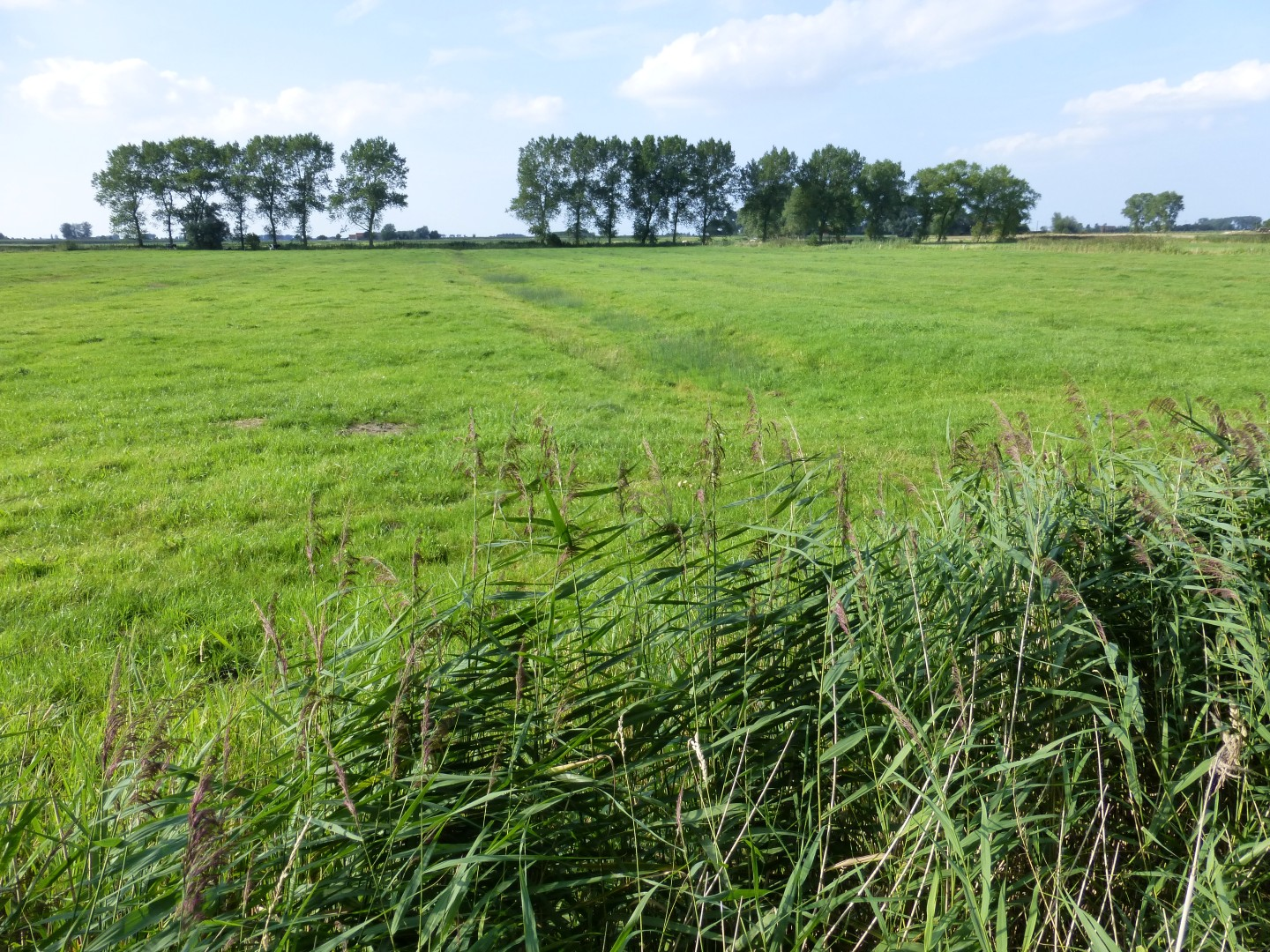 hooilandcomplex met ontwateringslaantjes in de Meetkerkse Moeren